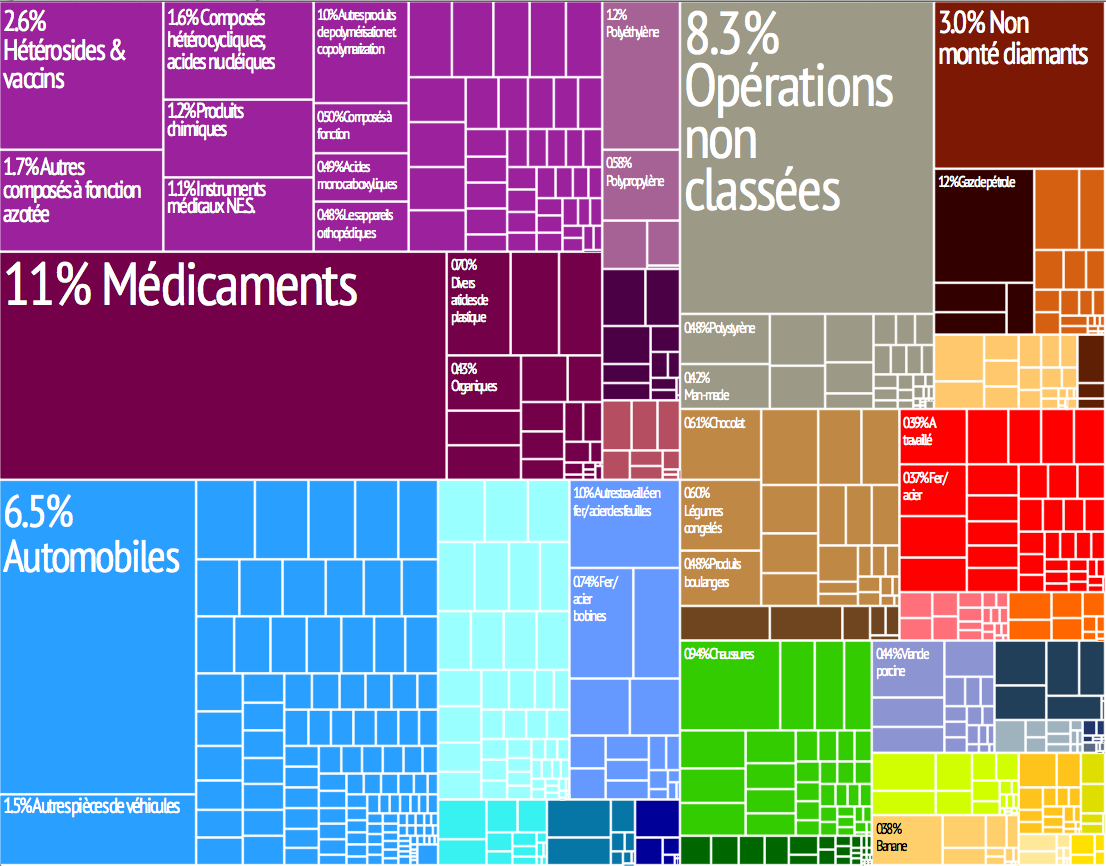 Représentation graphique des exportations de produits du pays dans 28 catégories de couleur. Chaque case de couleur représente un produit et sa taille est proportionnelle à la part des exportations totales du pays que le produit représente.